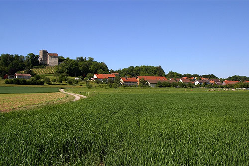 Dorf und Schloss Habsburg (Nr. 03.1-5068)